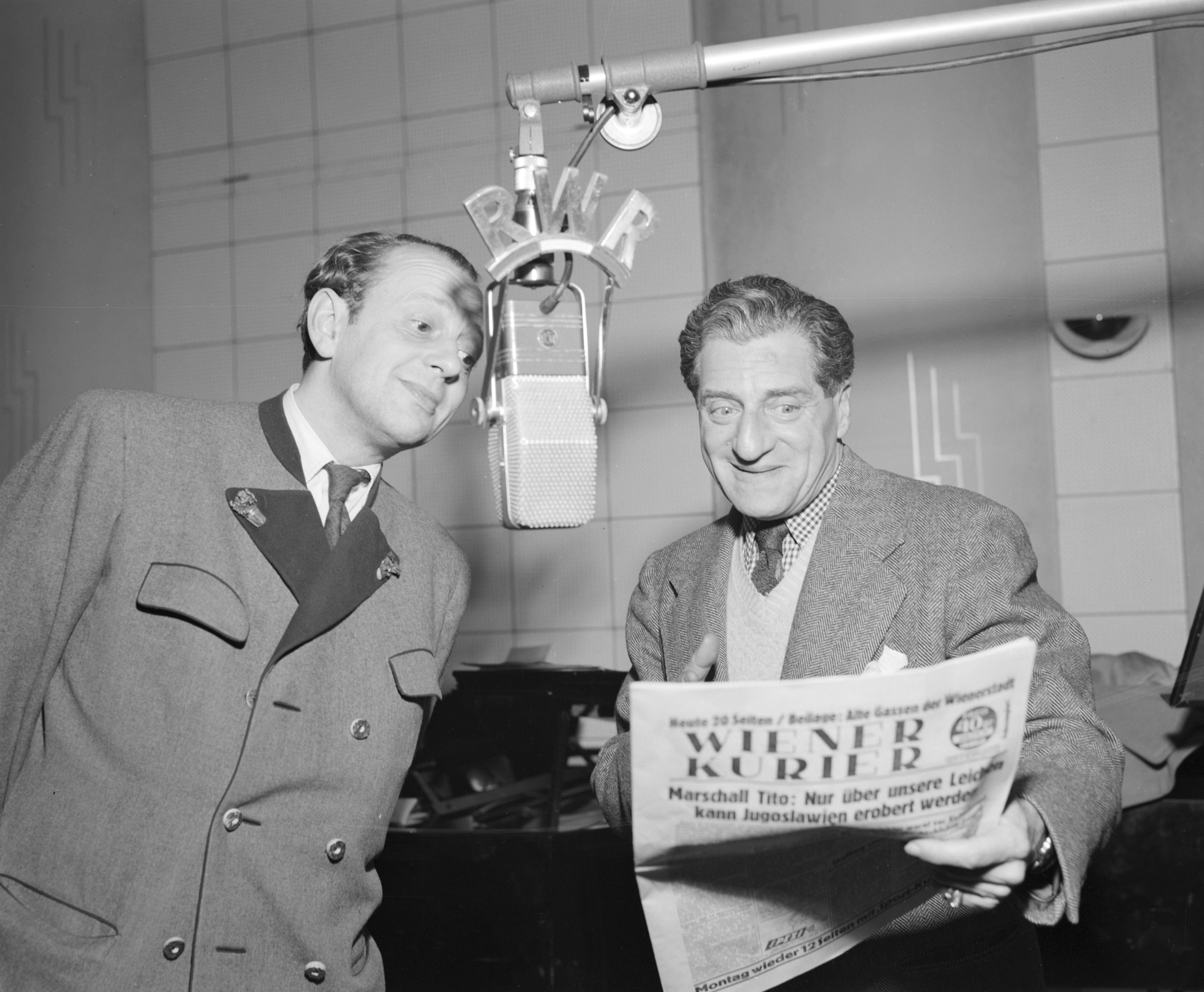 Ernst Waldbrunn und Karl Farkas im Studio des Senders Rot-Weiß-Rot bei einer Doppelconférence für die Sendung Aktualitätlichkeiten. Farkas hält ein Exemplar des Wiener Kuriers